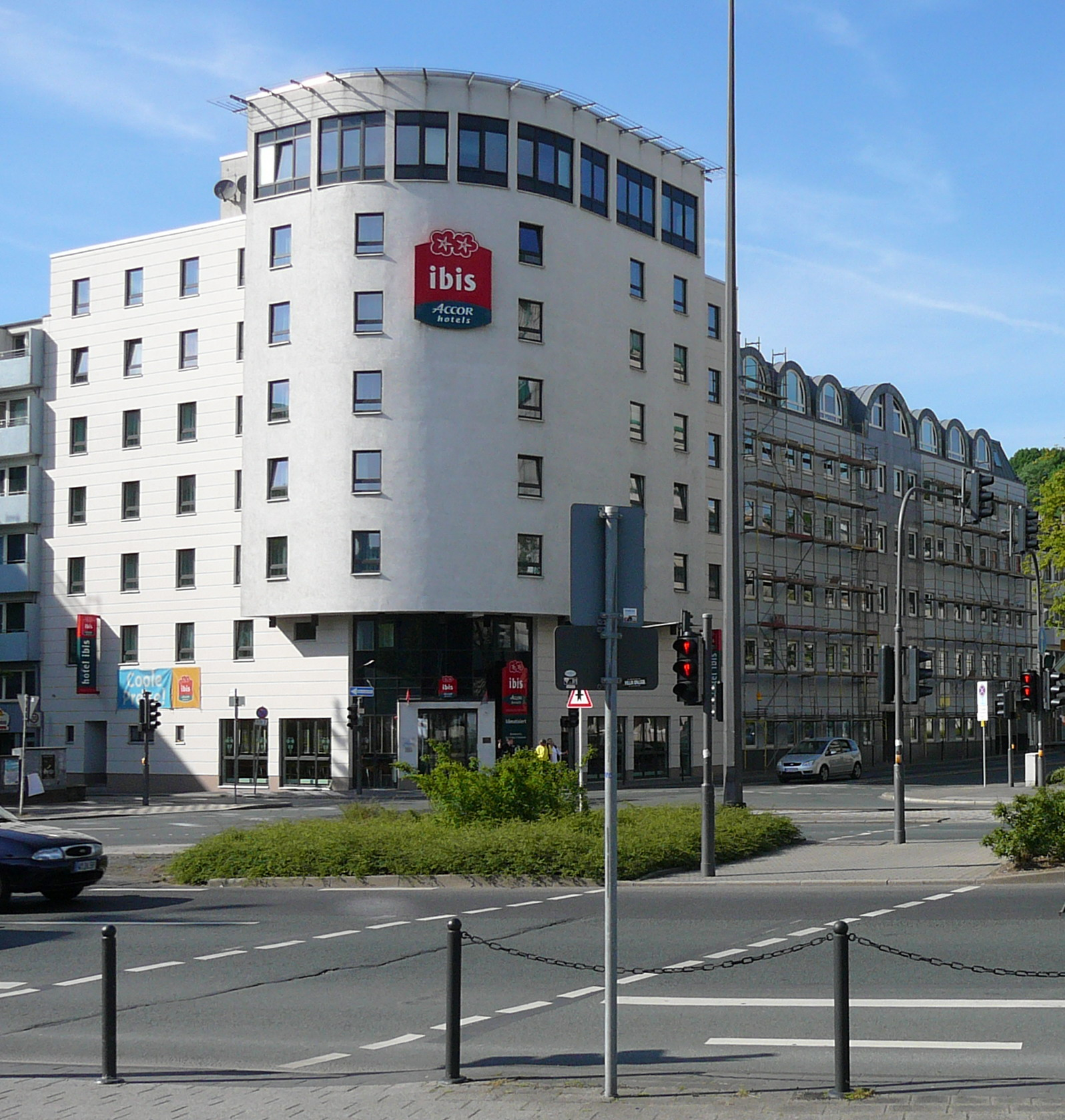 Ibis Hotel, Wuppertal